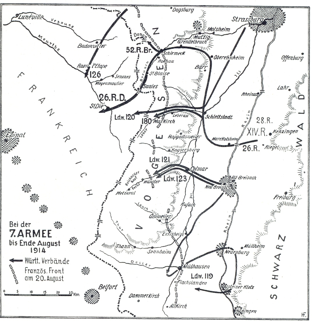 Karte: 7. Deutsche Armee im August 1914